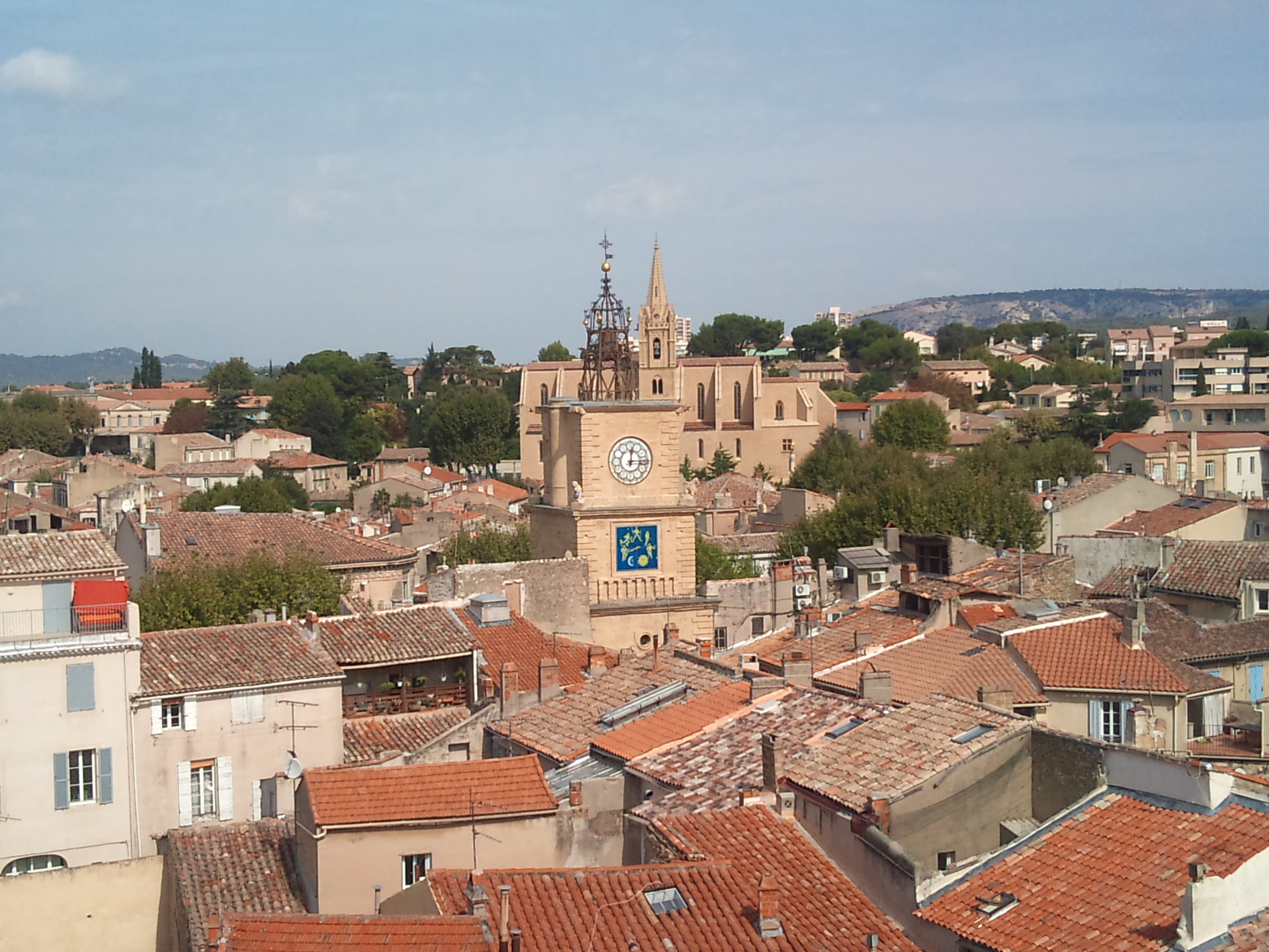 Photo prise en 2012